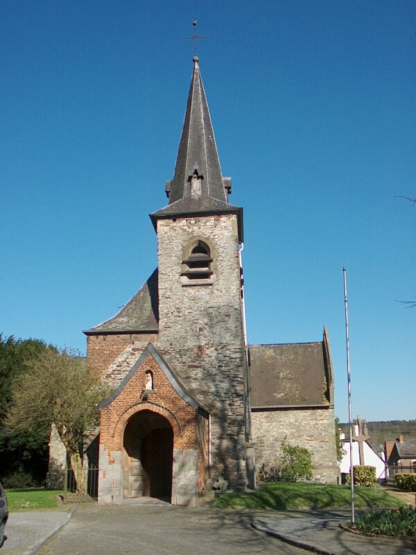 Église Saint-Martin (Oisquercq) - Les photos de Badplayer